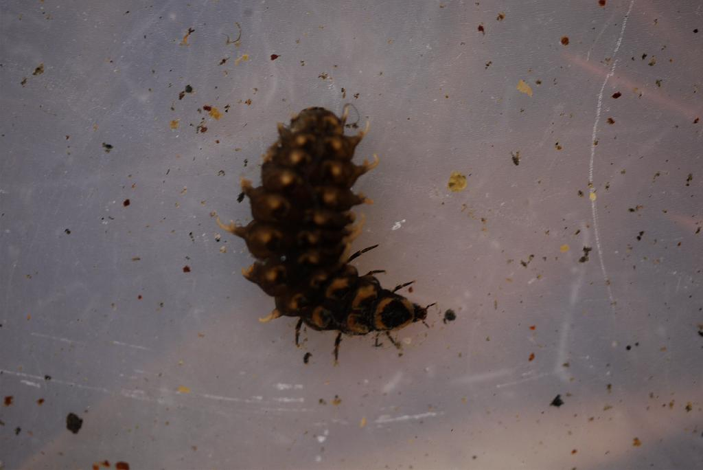 Luciola_cruciata：ゲンジボタル幼虫 2011/02/27 和歌山県田辺市：Tanabe City, Wakayama Pref. Japan